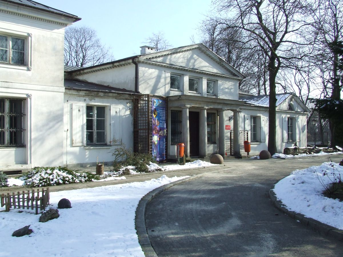 Pałac Branickich, Warszawa, al. Na Skarpie 20/26.